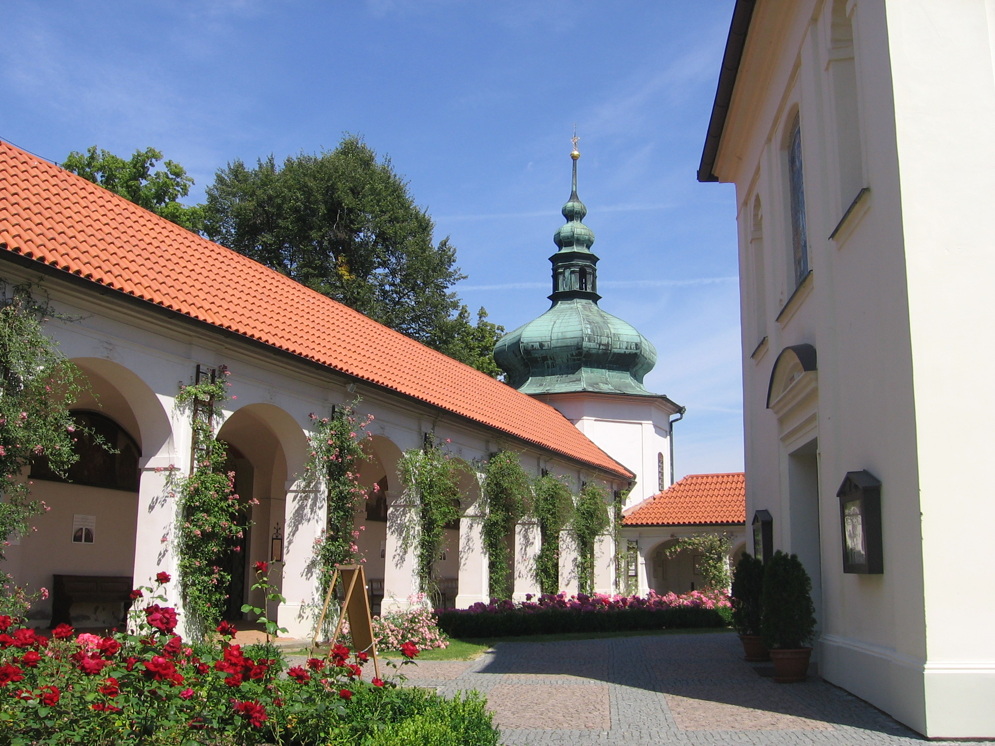 Klášter Klokoty